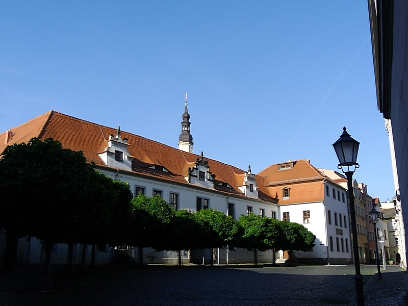 Von Bürgermeister Nikolaus von Dornspach als Lateinschule 1586 gestiftet. Der Renaissancebau wurde im 18. Jahrhundert erweitert.